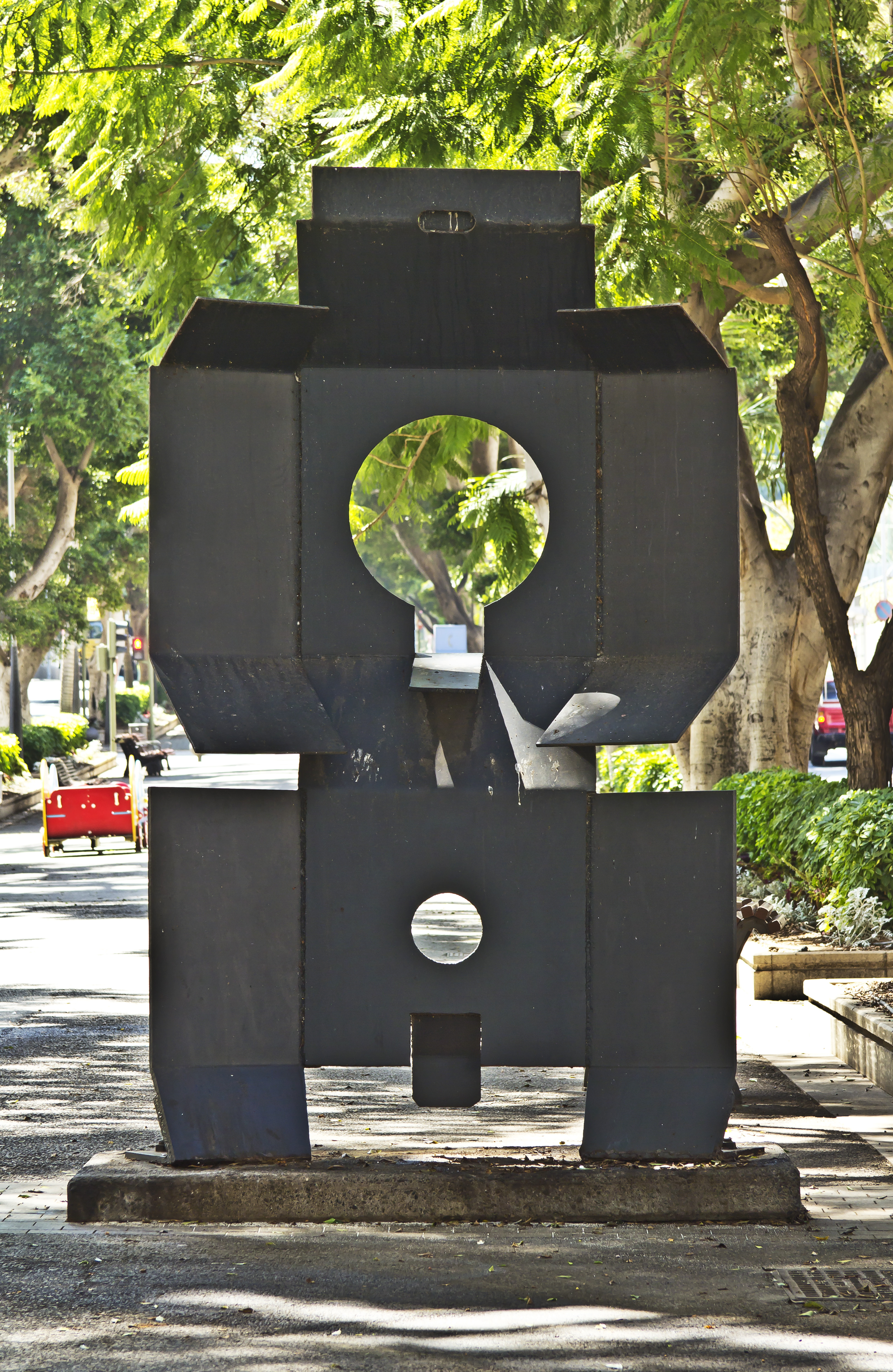 Die Plastik „Hombre“ der 1922 in Tucumán (Argentinien) geborenen Künstlerin María Simon wurde 1973 Rahmen der „Exposición Internacional de Escultura en la Calle“ der Architektenkammer der Kanarischen Inseln auf der Avenida de los Reyes Católcos in Santa Cruz de Tenerife aufgestellt. Die Maße sind 2,87m x 1,70m x 0,70m